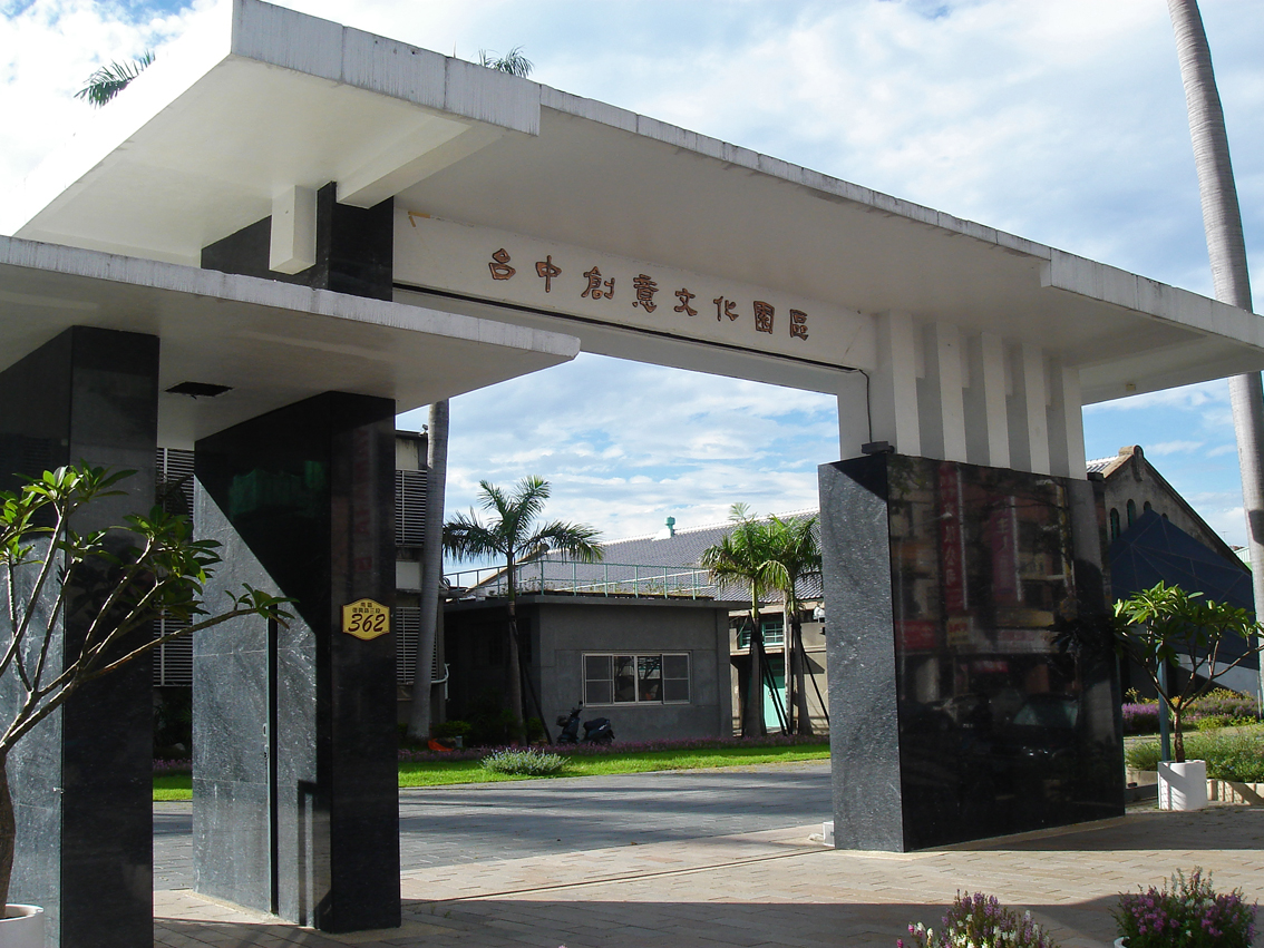 台中創意文化園區。